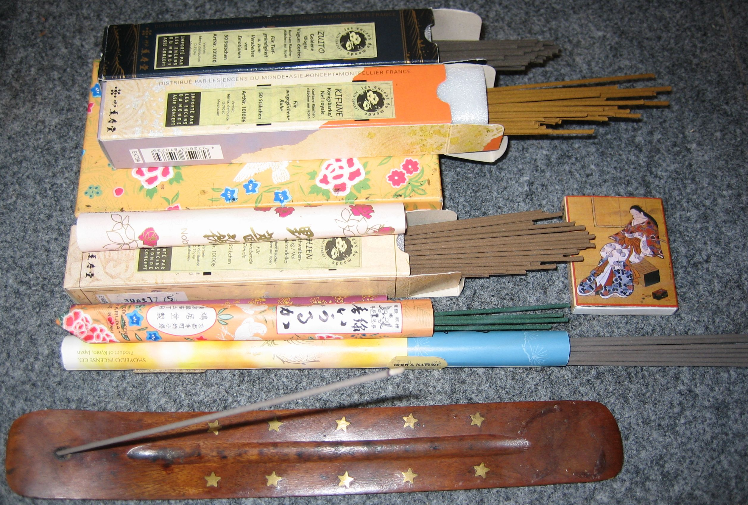 Japanische Räucherstäbchen und indischer Stäbchenhalter